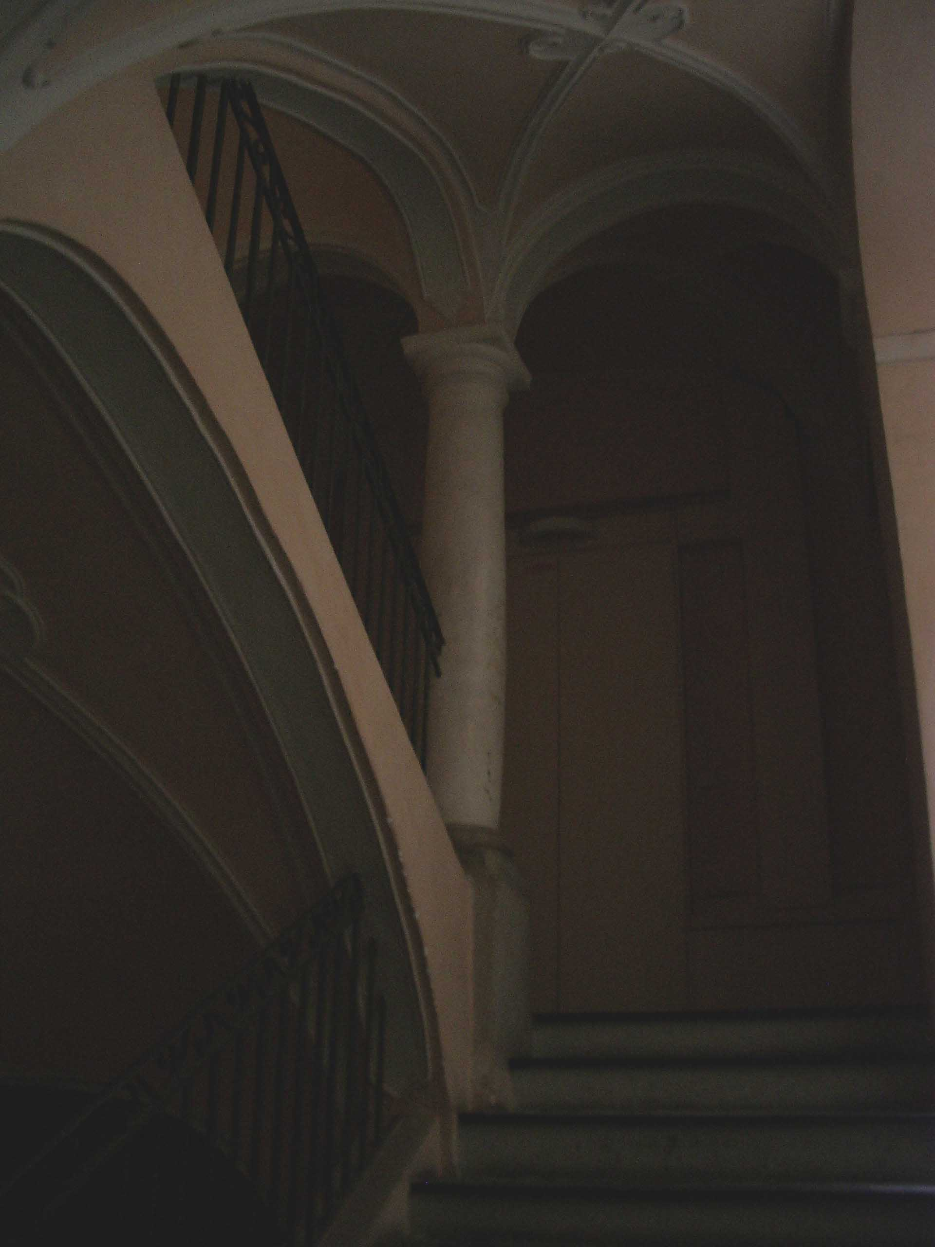 Une des nombreuses cages d'escalier baroque dans le centre historique de Nice.